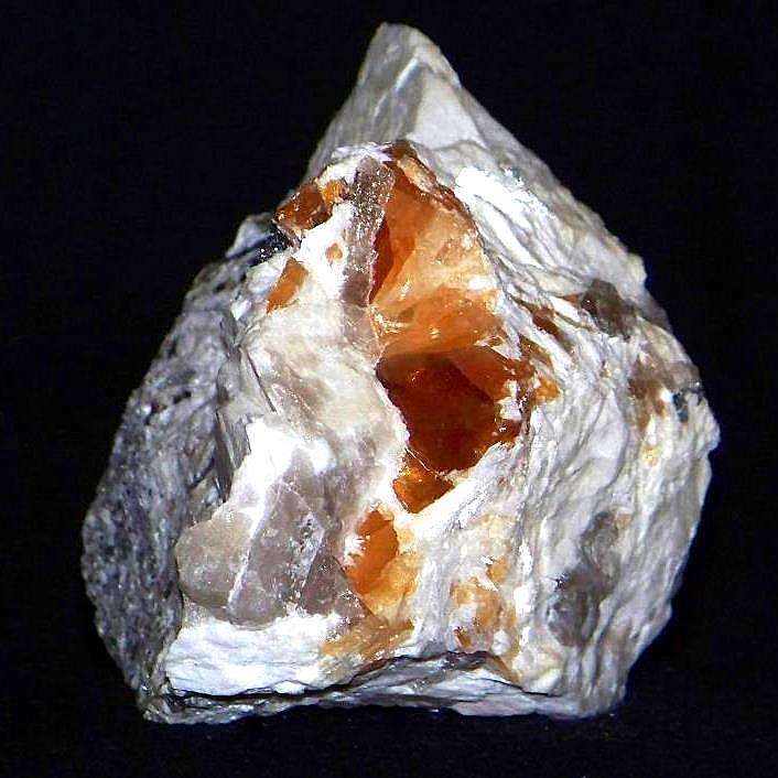 Kalcyt (brązowy) z pegmatytów, powstały w procesach hydrotermalnych i pneumatolitowych związanych z działalnościa pegmatytową